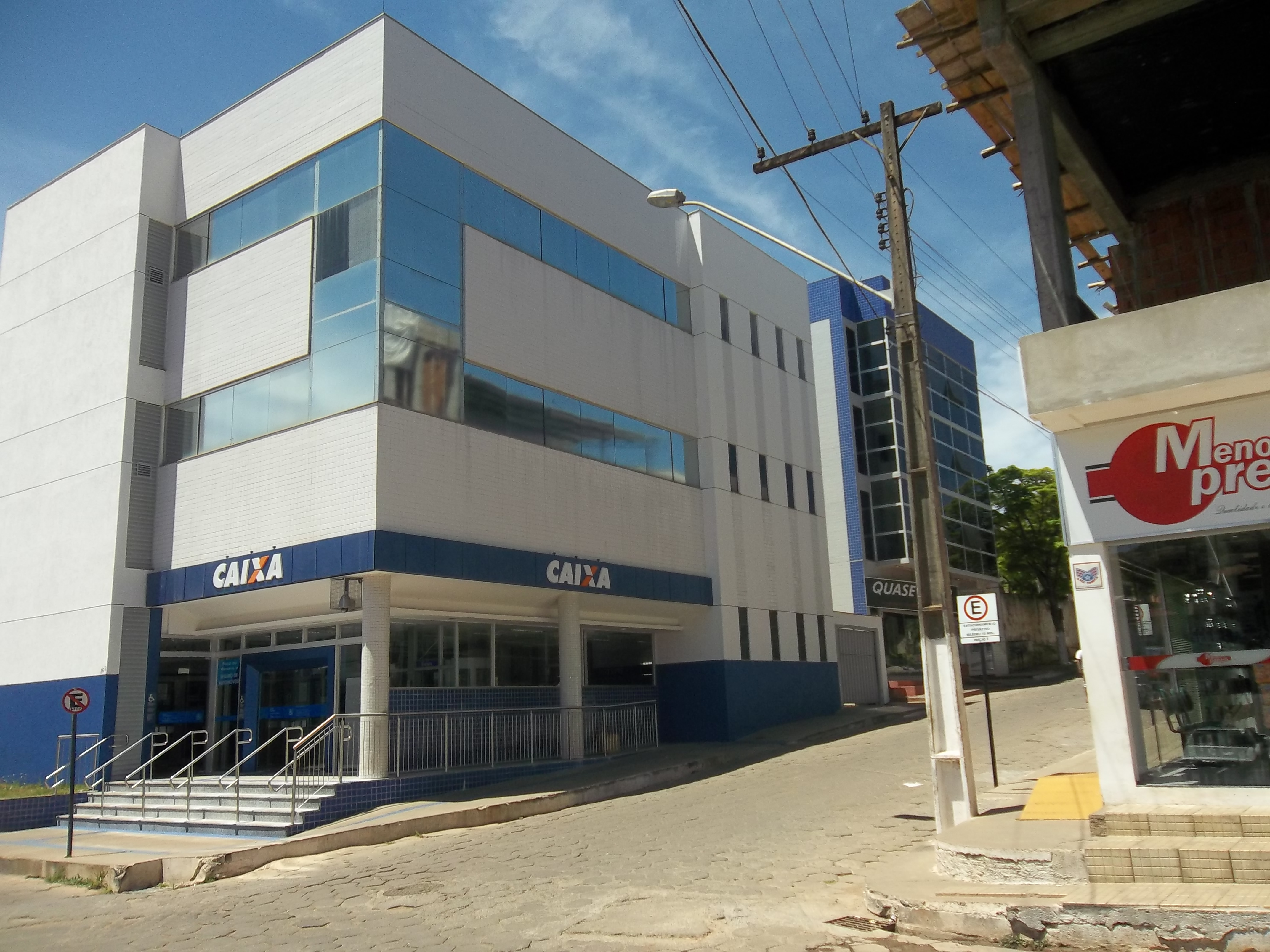 Sede da Caixa em Capelinha.